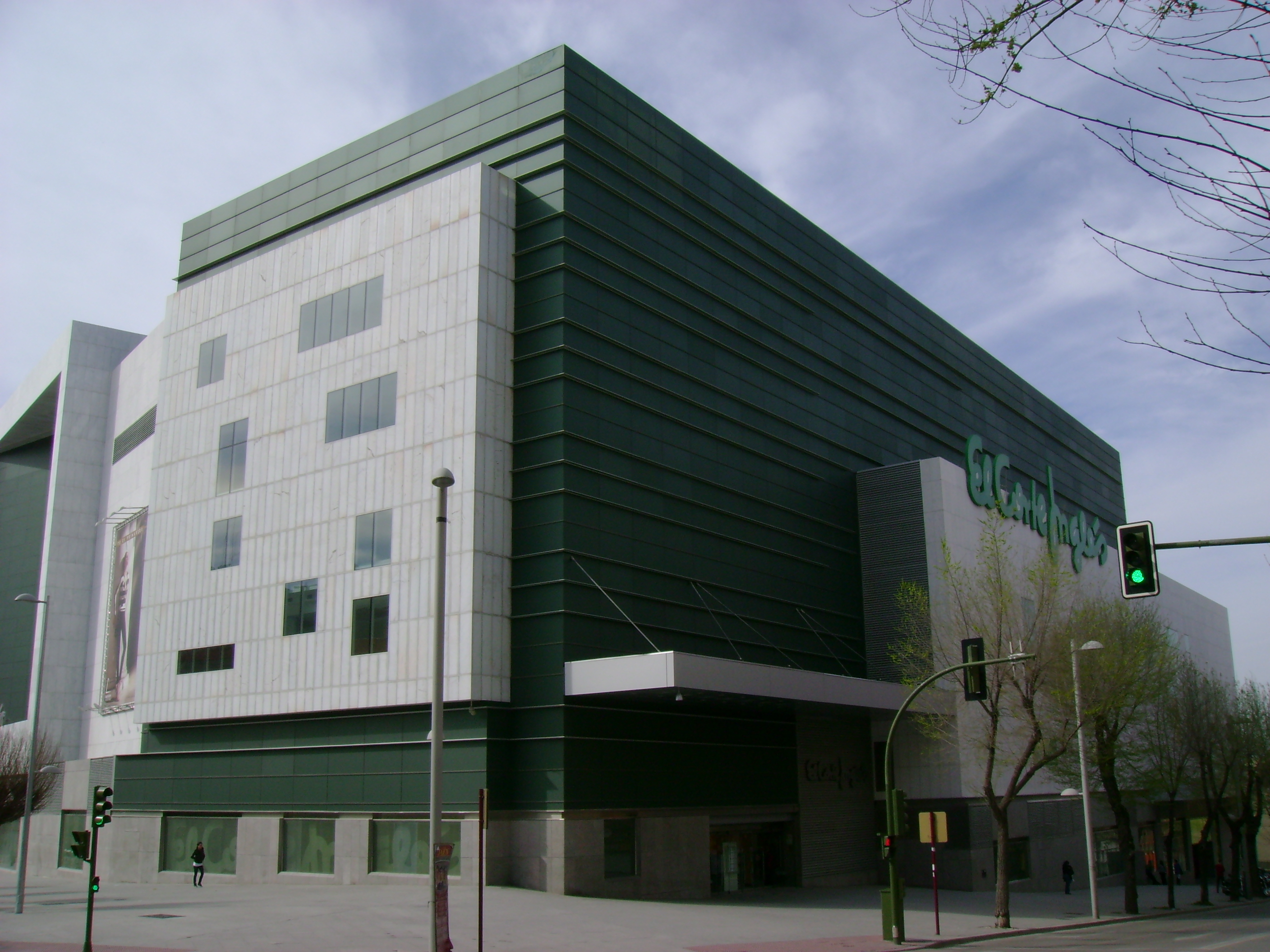 Vista del edificio de El Corte Inglés de Jaén desde la Avenida de Madrid.